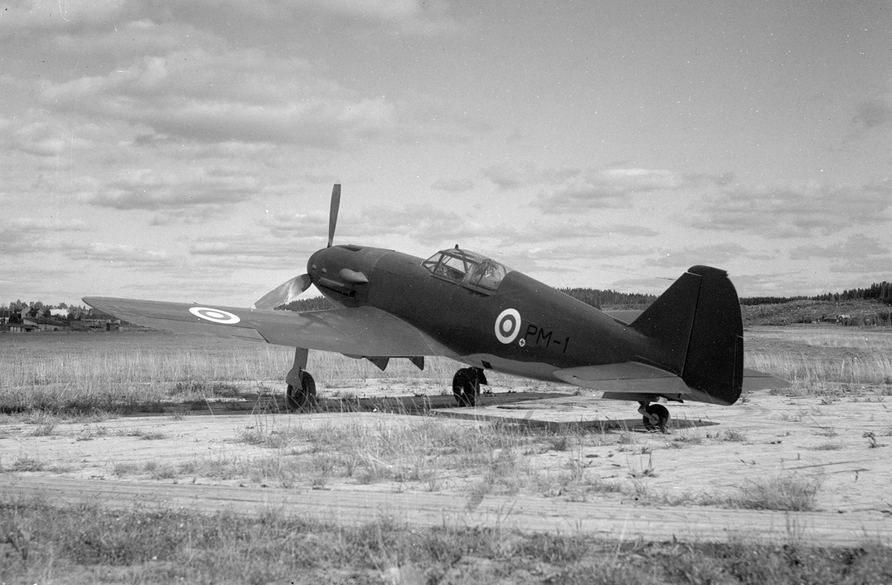 VL Pyörremyrskyn prototyyppi PM-1 Tampereella syyskuussa 1945.